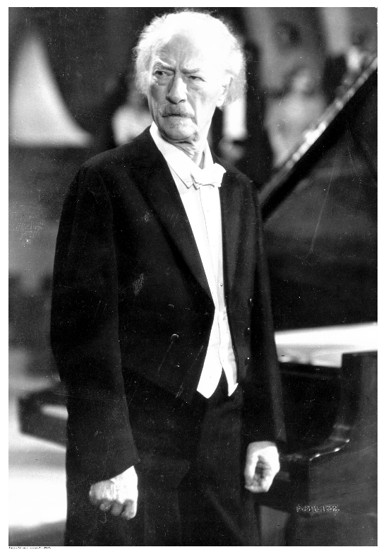 Снимка на Игнаци Ян Падеревски, полски пианист, композитор и политик.